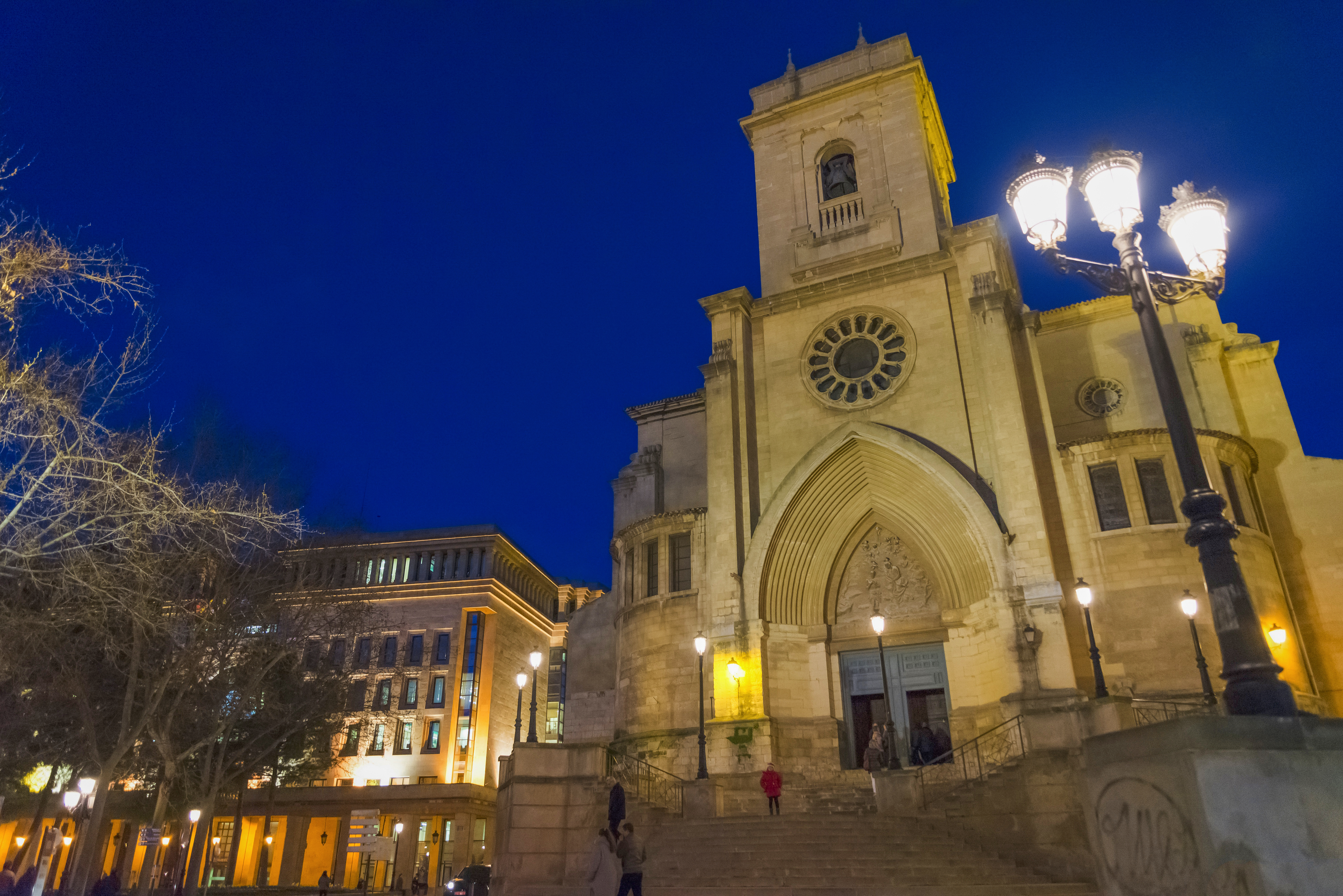 Catedral de Albacete, San Juan de noche